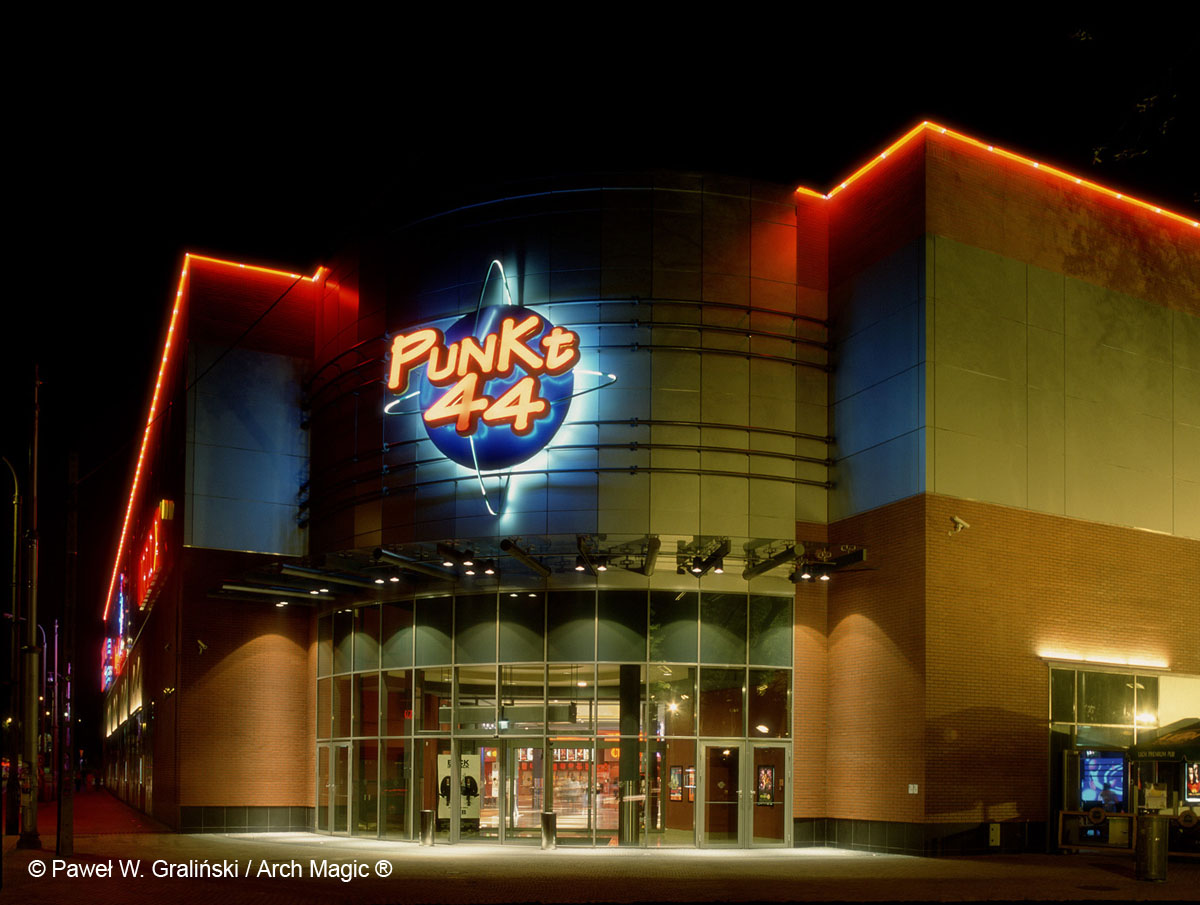 wejście do Punkt 44 Katowice